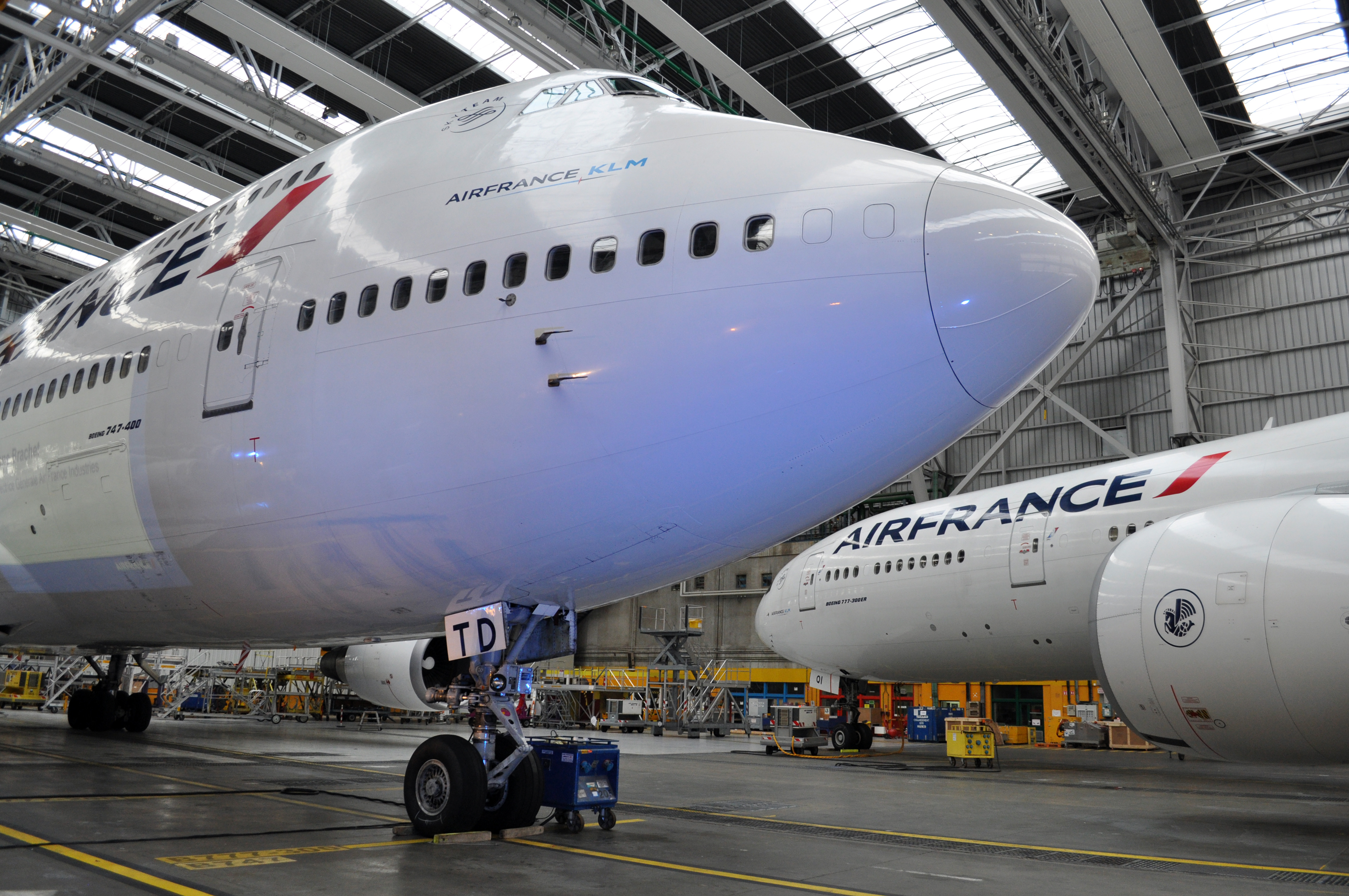 VISIT OF MAINTENANCE AREA AIR FRANCE AT CDG FOR THE LAST FLIGHTS OF AIR FRANCE 747. F-GTID MSN 25600 LN 901 B747-428 / 747 / 747-400 AIR FRANCE F-GSQI MSN 32725 LN 502 B777-328ER / 777 / 777-300 / 777-300ER AIR FRANCE